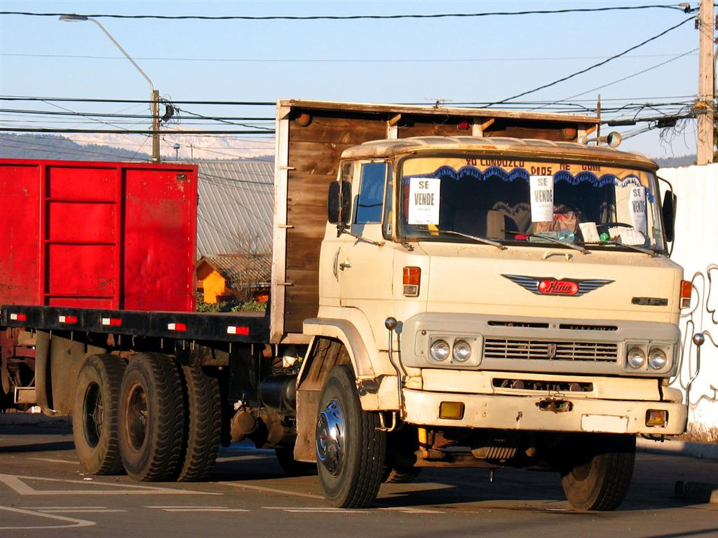 Hino KF 420 1980